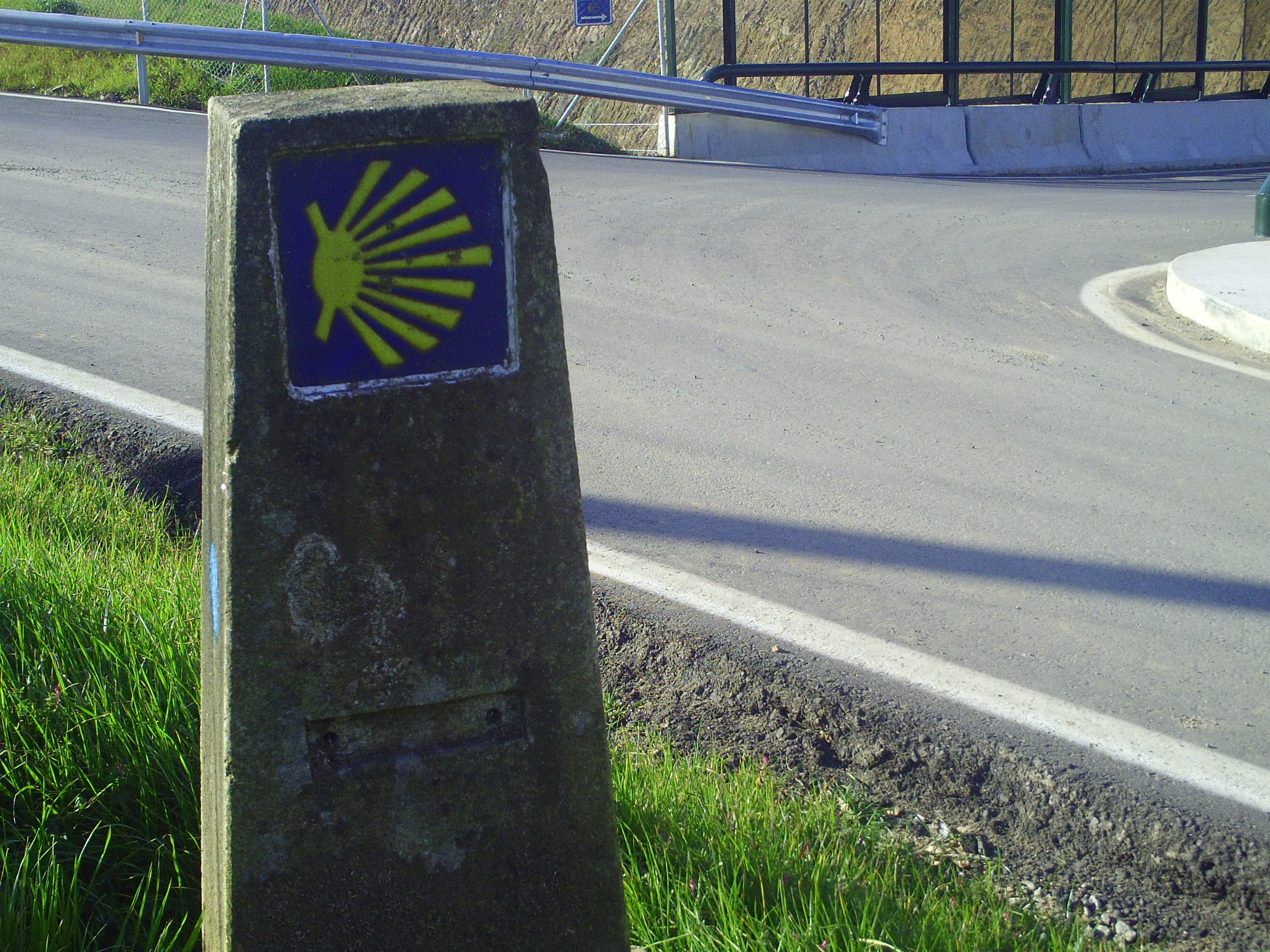 Señalización del Camino de la Plata a su paso por Angrois